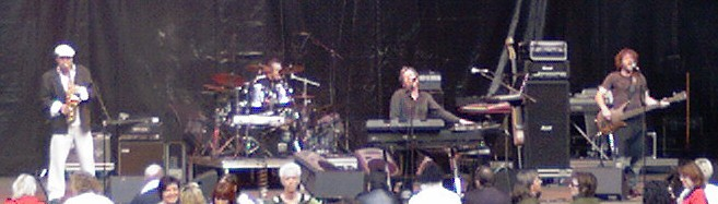 Moonjam (danish band)